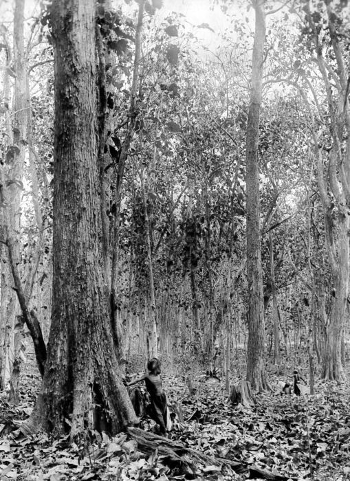 Negatief. Djatibos te Rembang